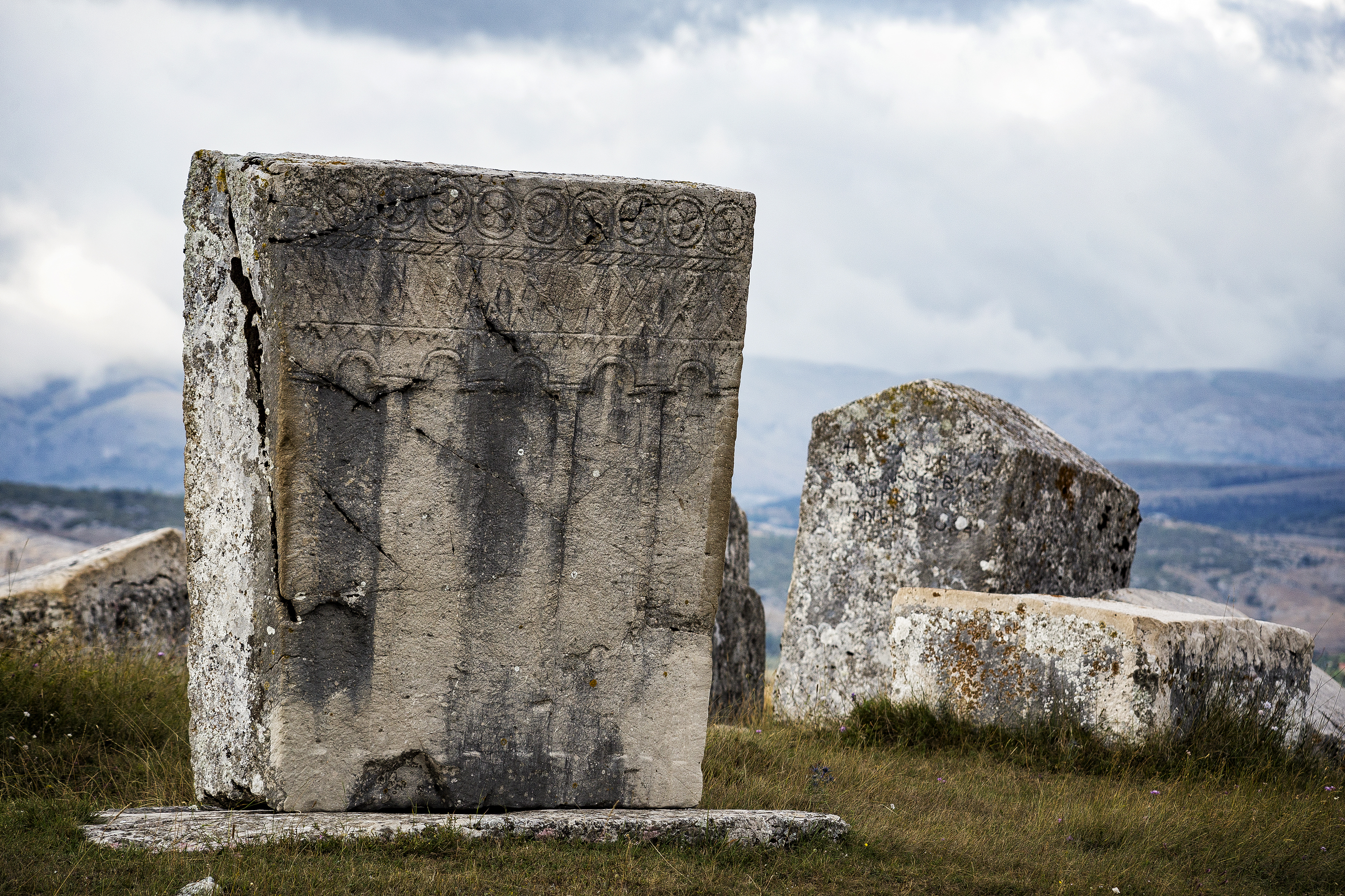 Средњевјековна некропола на Зборној гомили код Гацка. Припада периоду 14. и 15. вијека.